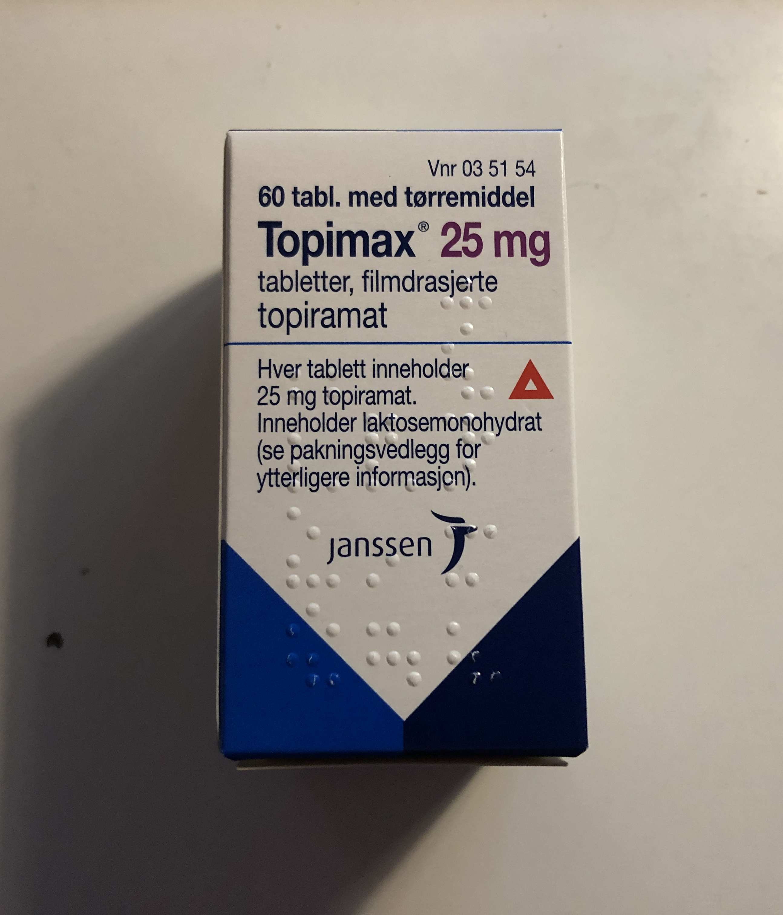 En pakke med Topimax (Topiramat)